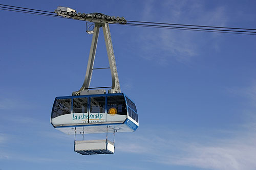 Pendelbahn Wiler-Lauchernalp